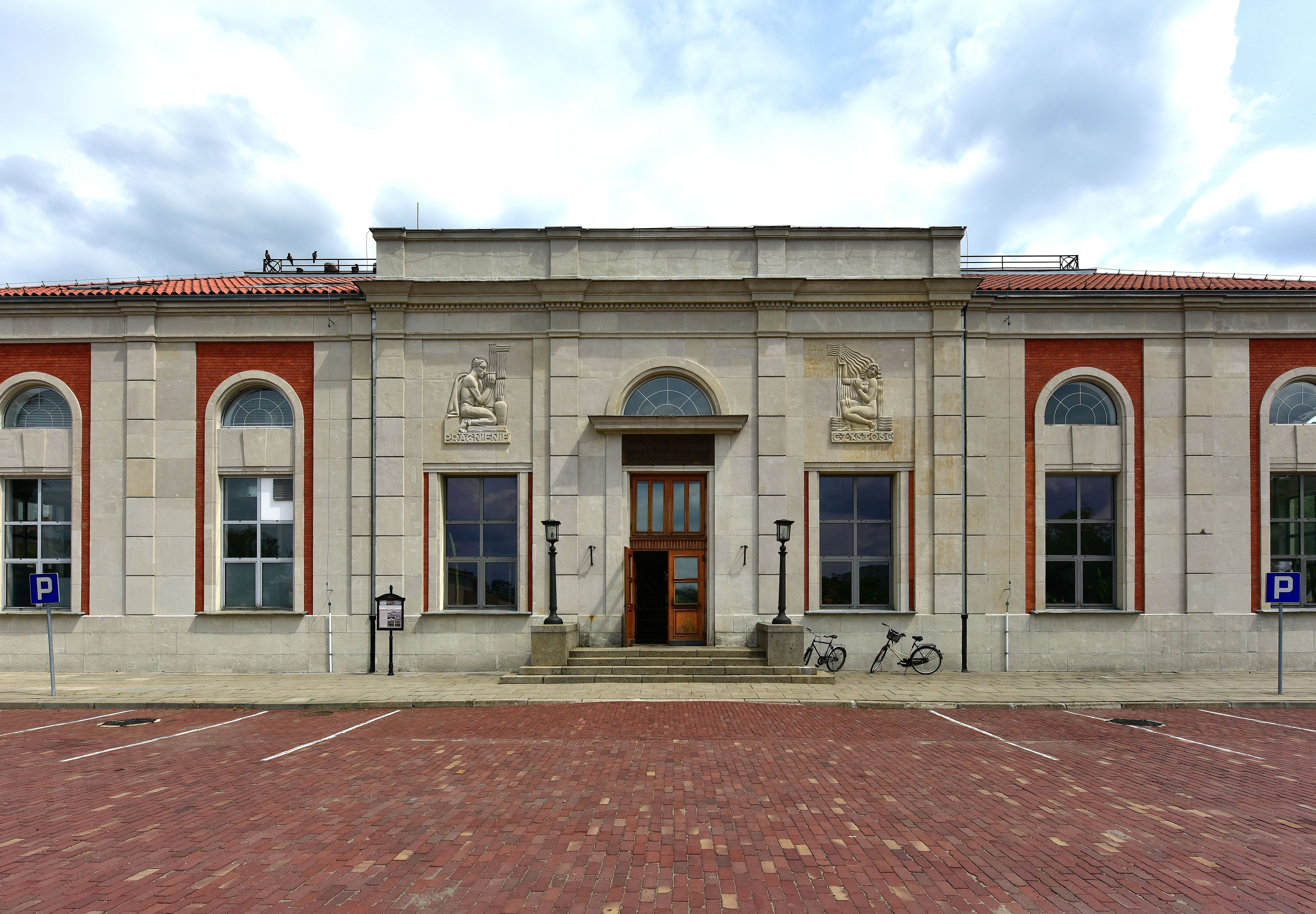 Budynek Zakładu Filtrów Pospiesznych w Zespole Stacji Filtrów w Warszawie